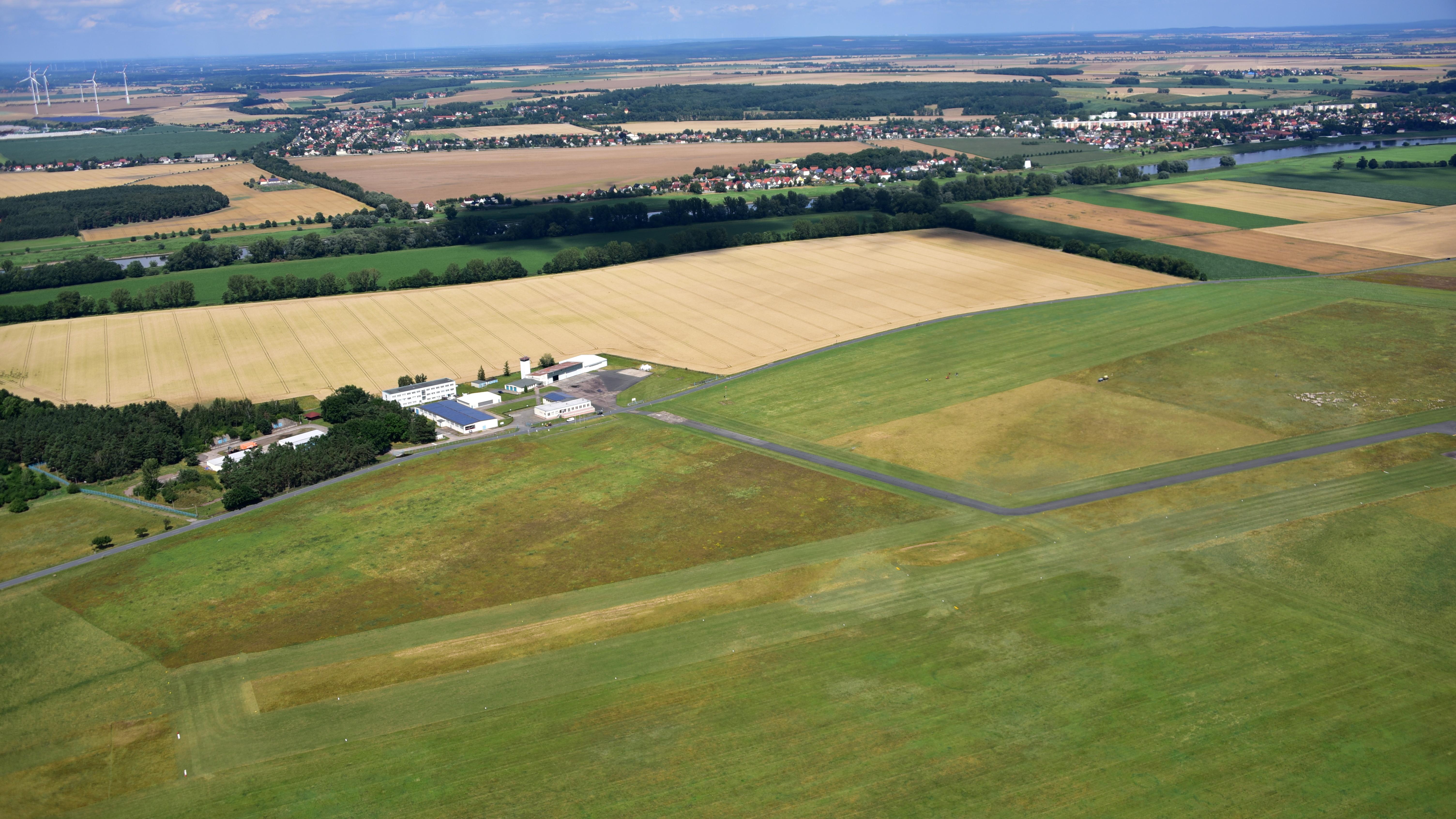 Riesa, Flugplatz, Luftaufnahme (2017)